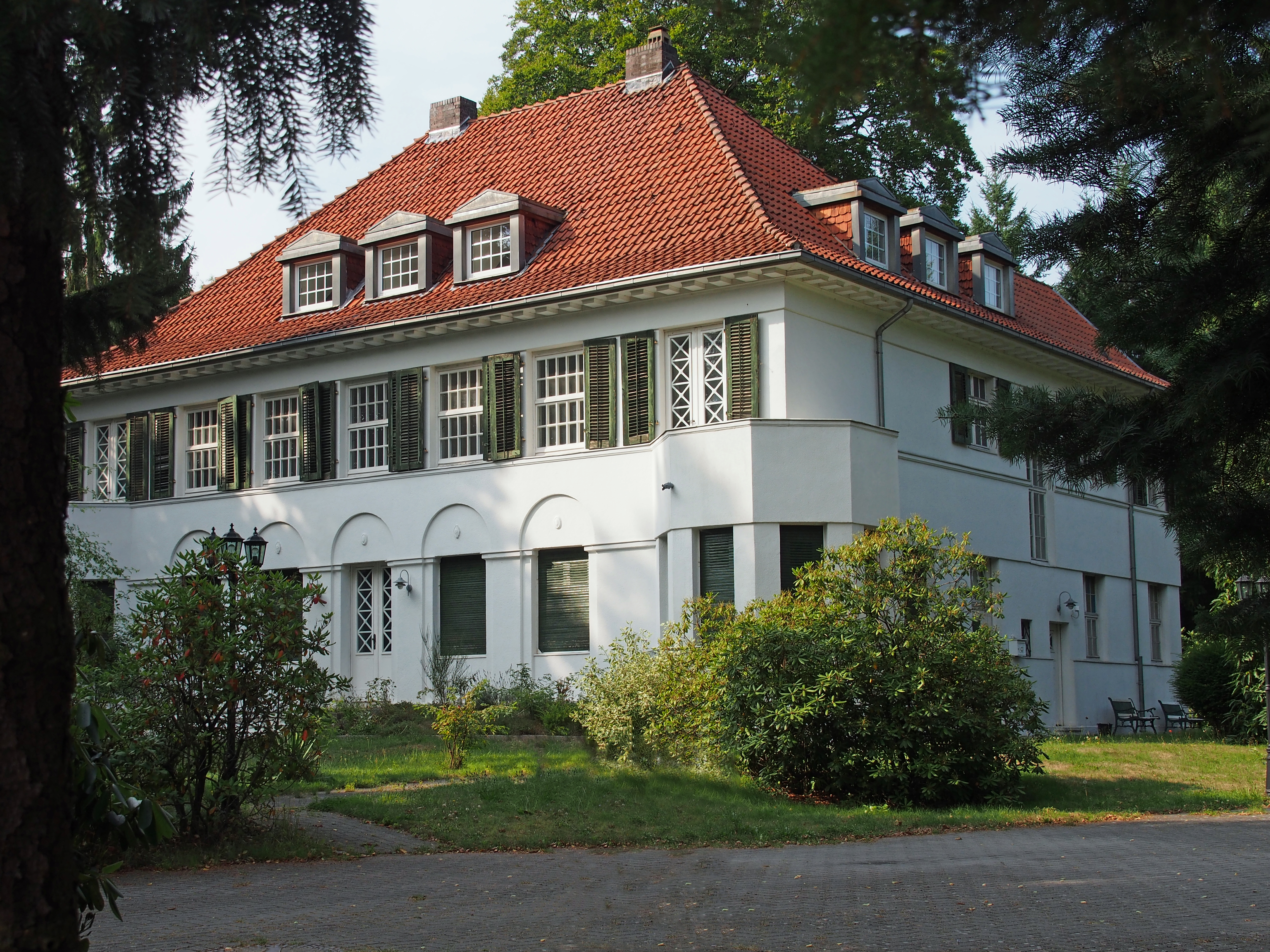 Denkmalgeschützte Villa in Unterlüß, Niedersachsen